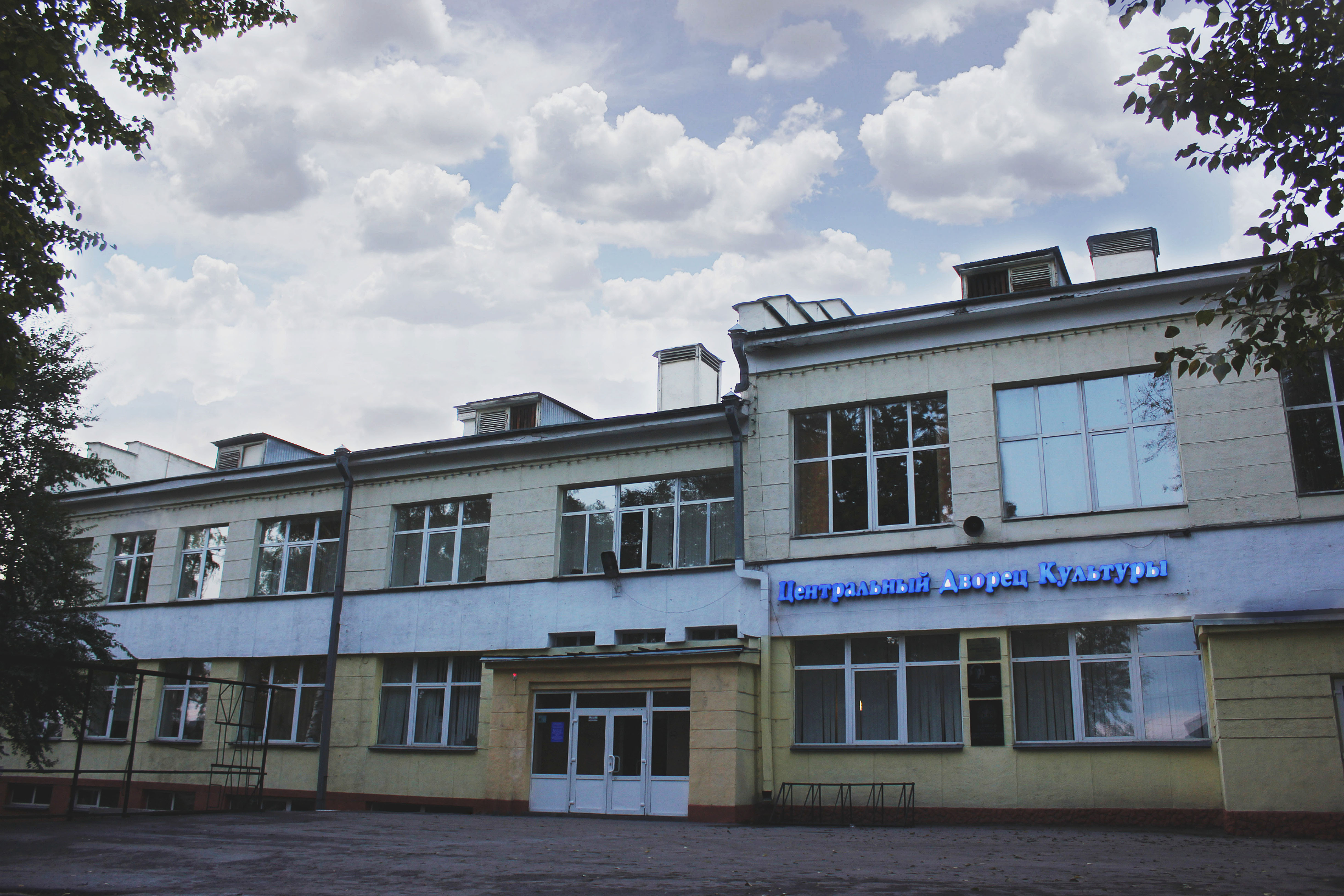 Дворец культуры шахтеров: проспект Кирова, 25, Ленинск-Кузнецкий, Кемеровская область